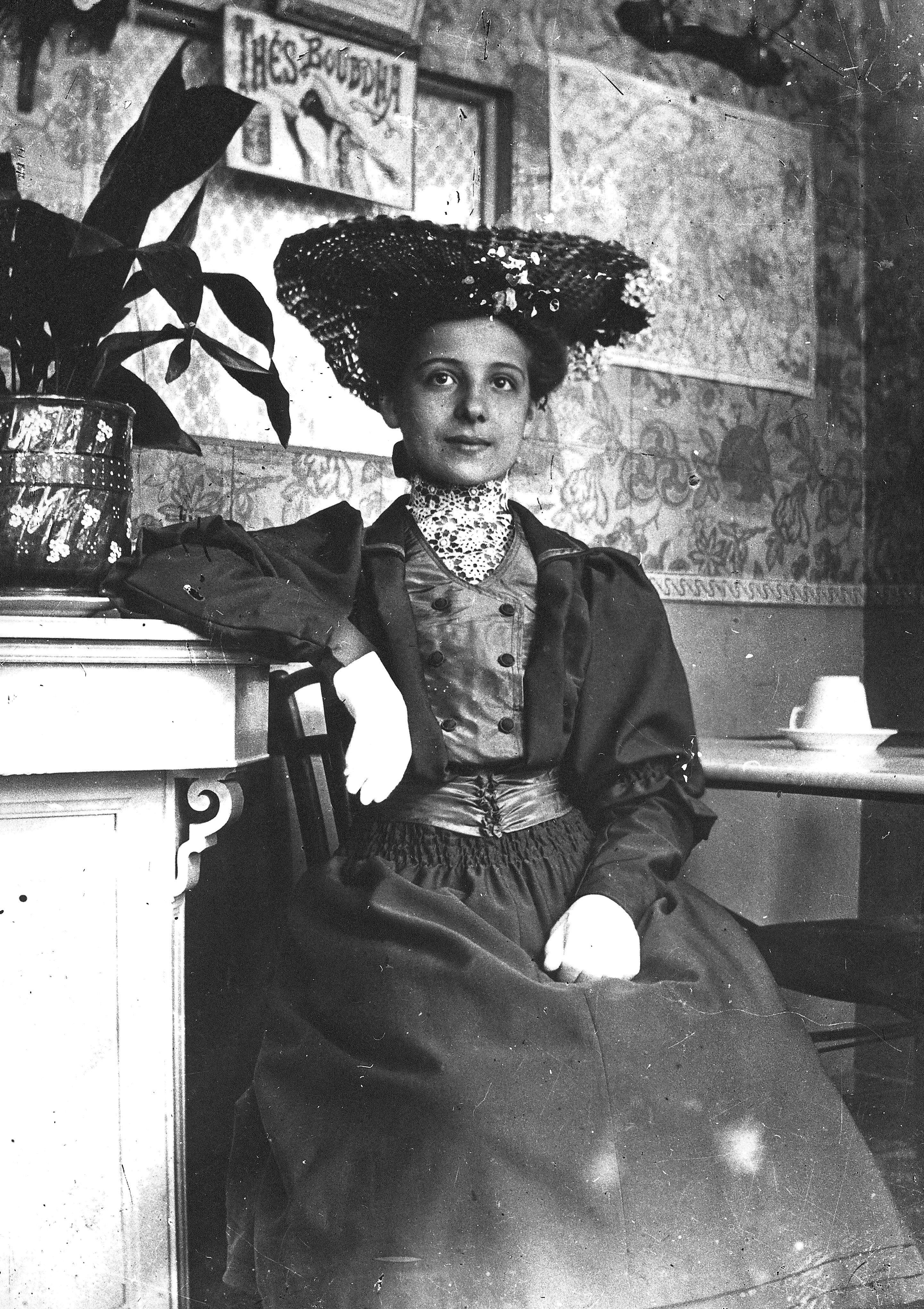 Originaltitel: Lucie dans la Crèmerie Chaude, 96 Boulevard du Montparnasse, Paris, (Paris, 1905), Frankreich. Die Fotografie zeigt Lúcia Peretto (1890-1987), Nichte Antoni Gaudís. Sie heiratete den portugiesischen Maler Amadeo de Souza-Cardoso.